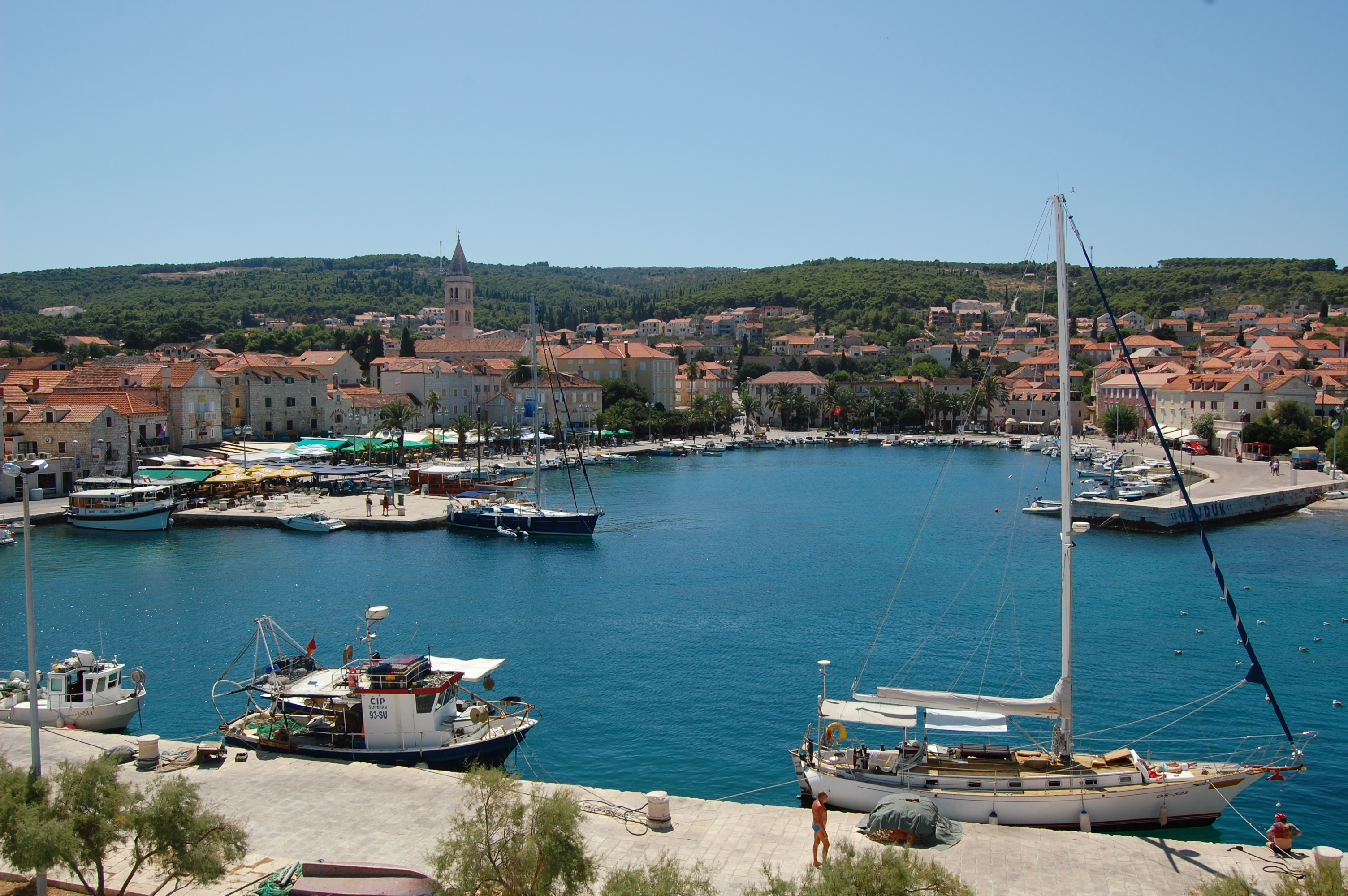 Veduta del porto di Supetar, sull'isola di Brazza